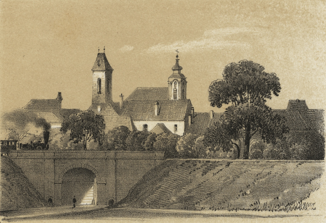 Český Brod